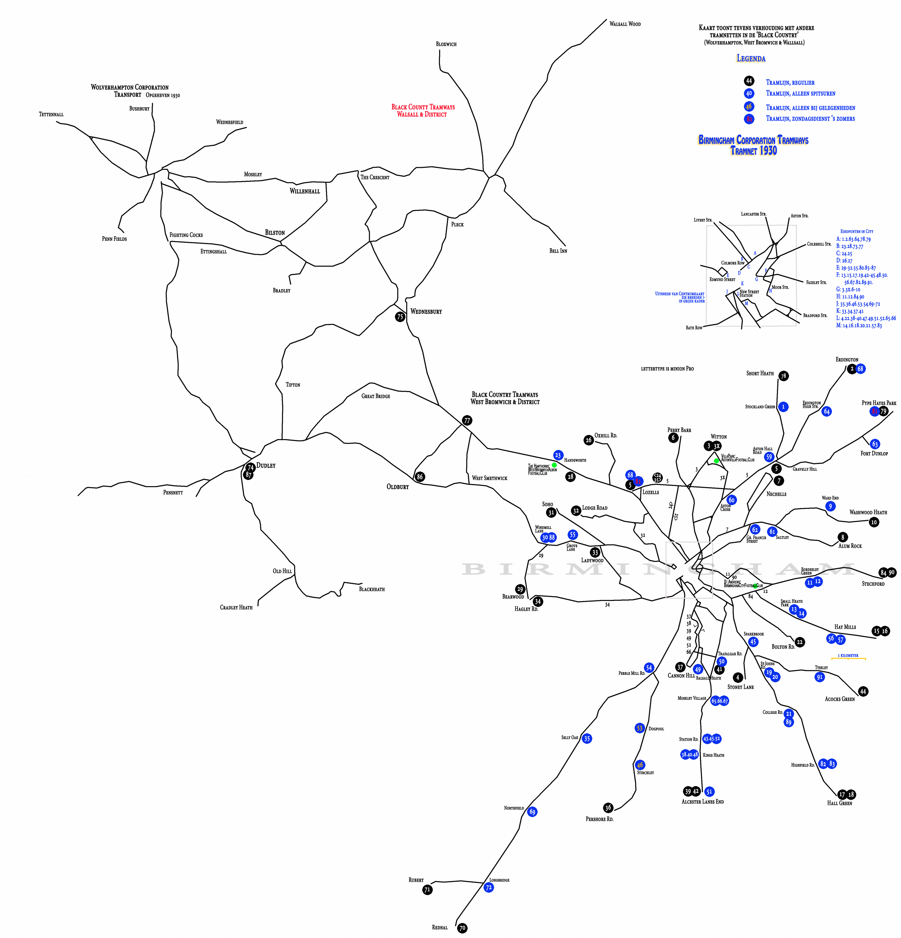 Schematische weergave tramnet Birmingham (UK), 1930